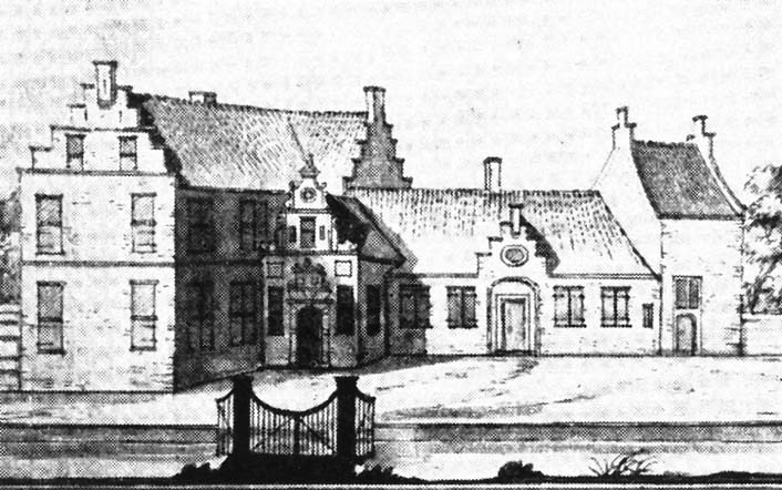 De Hottinga State te Tzum, getekend in 1723 door J. Stellingwerf